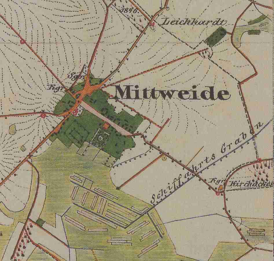 Mittweide, Ortsteil der Gemeinde Tauche, Lkr. Oder-Spree, Brandenburg, Ausschnitt aus dem Urmesstischblatt 3950 Groß Leuhen von 1846